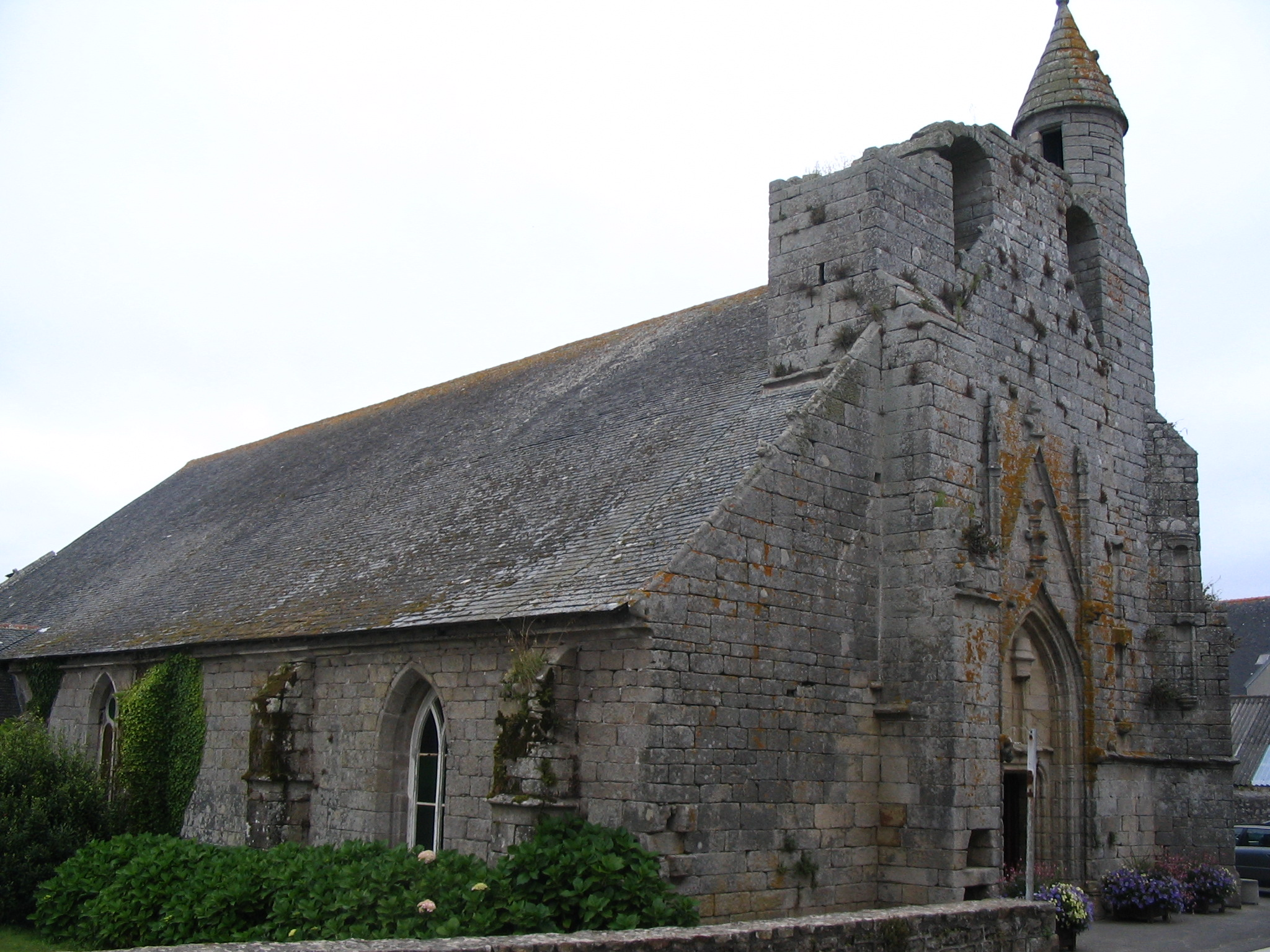 Eglise de Kerity, XVIème siècle, Penmarc'h, Finistère, France